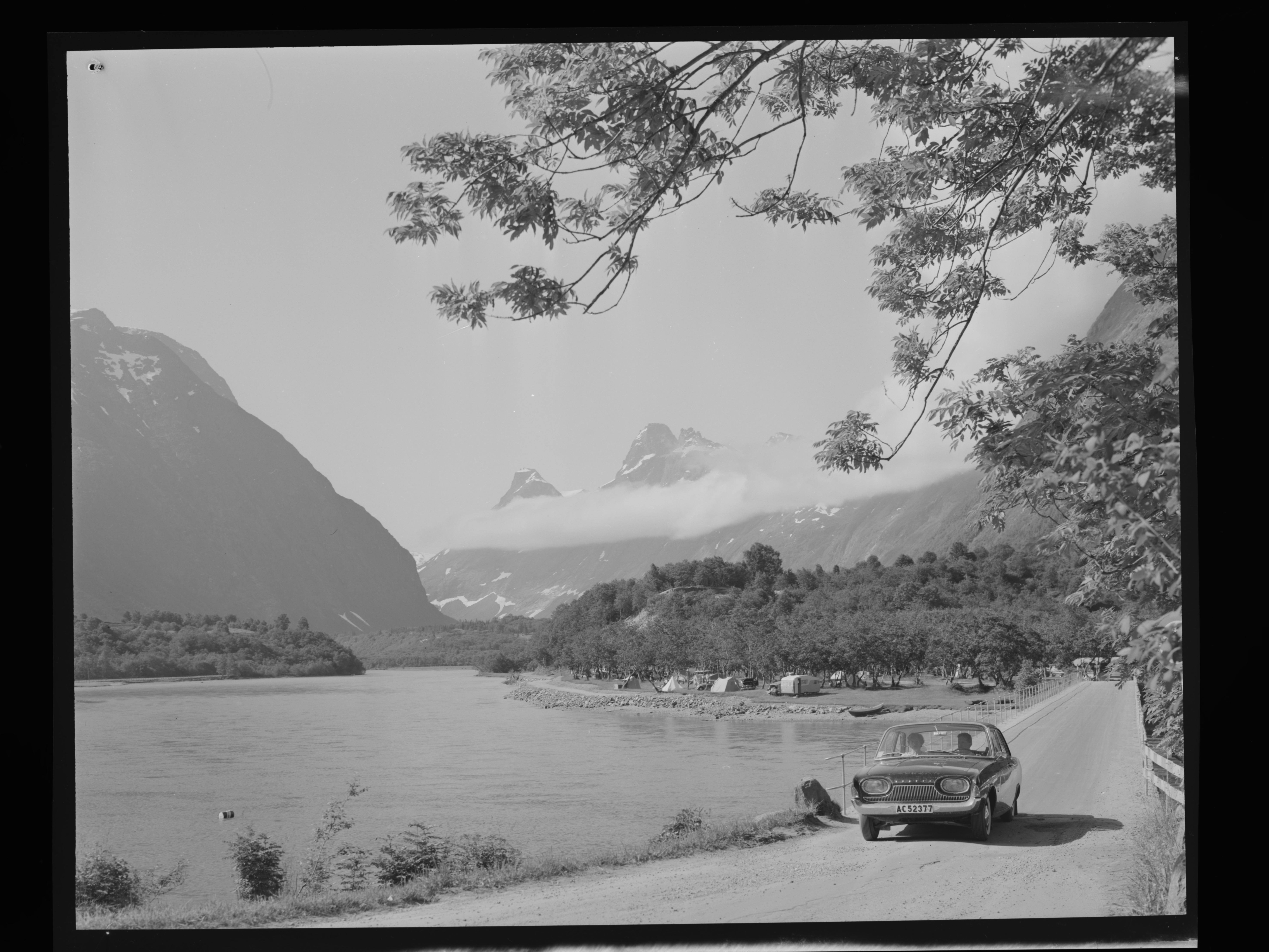 Bildet er hentet fra Nasjonalbibliotekets bildesamling. Anmerkninger til bildet var: fotograf: Å.M. Romsdalen, Rauma, Møre og Romsdal